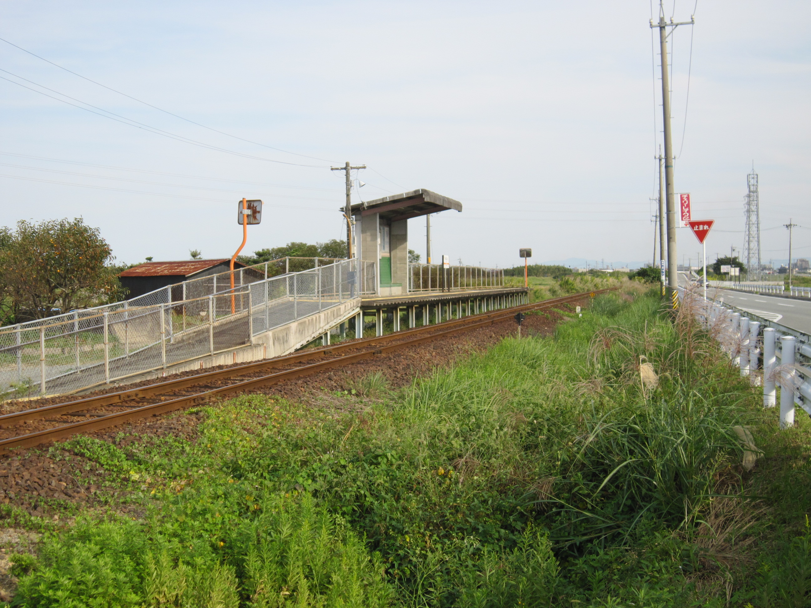 ホーム 投稿者撮影